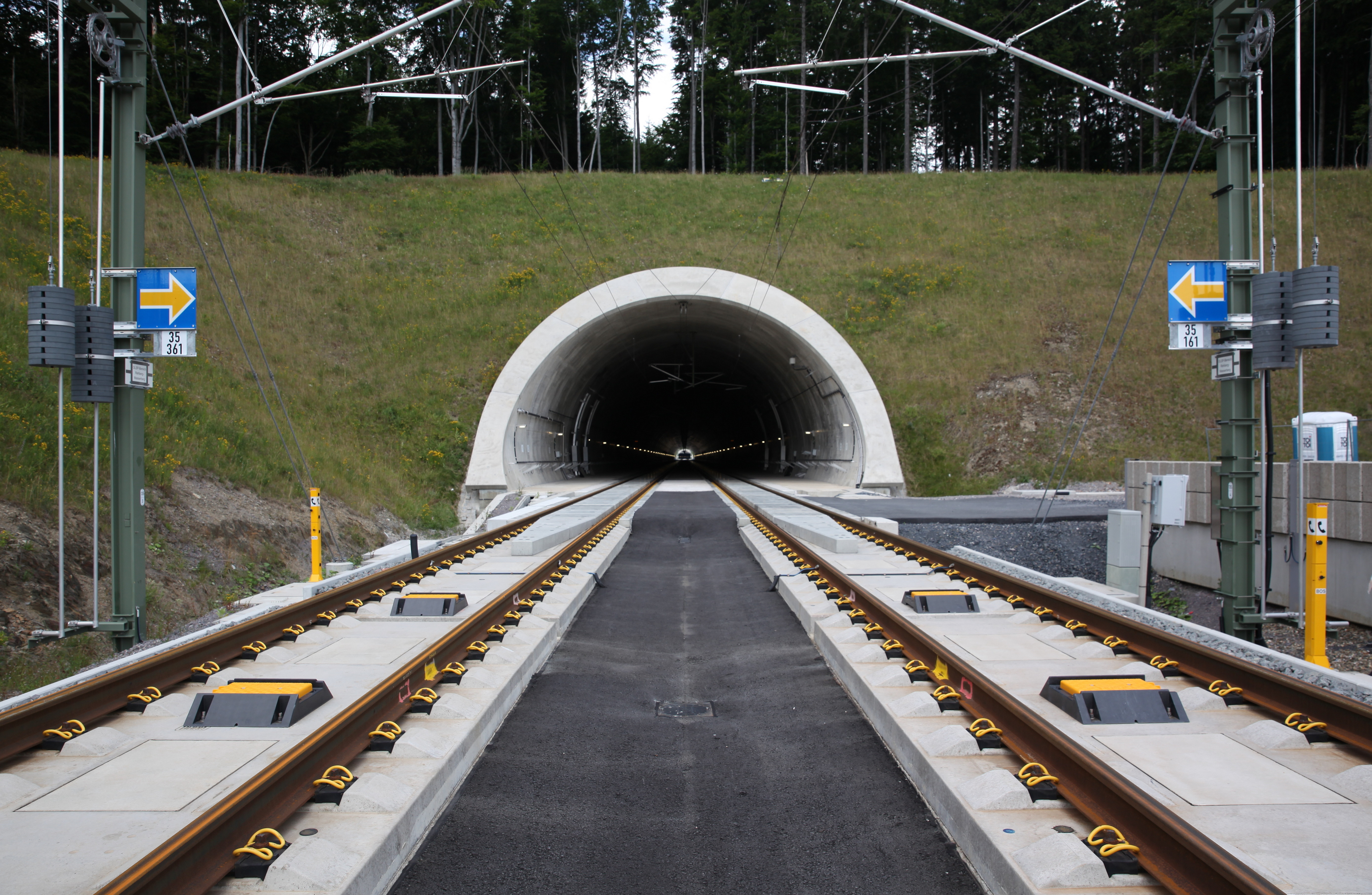 Südportal Tunnel Rehberg